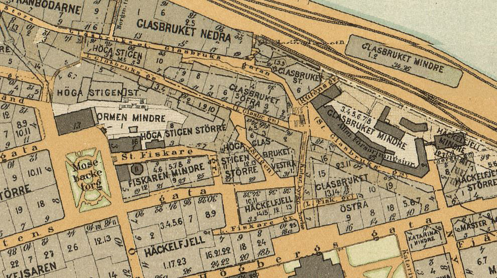 Del av karta över Stockholm visande nordöstra Södermalm med Stora Glasbruksgatan och Lilla Glasbruksgänd.